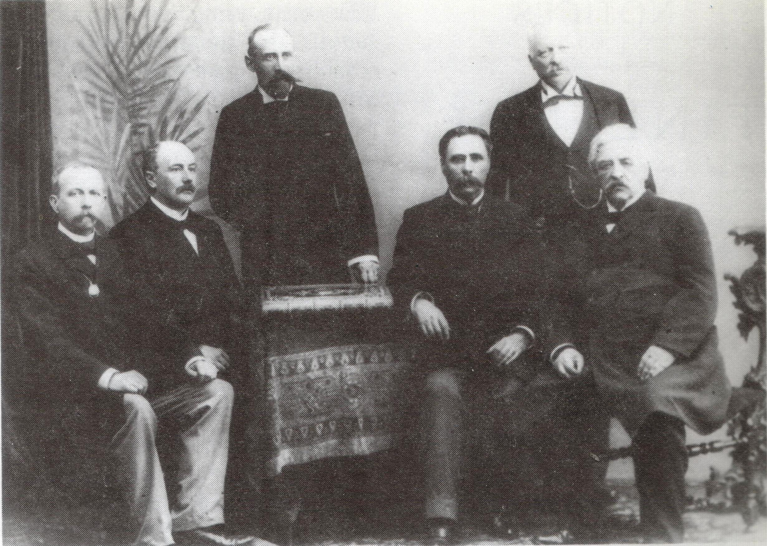 Lähetystö, jonka tarkoituksena oli viedä helmikuun manifestia vastustanut kansainvälinen kulttuuriadressi tsaari Nikolai II:lle. Vasemmalta professori W. Bögger (Norja), professori W. van der Vlugt (Hollanti), tohtori C. M. Norman-Hansen (Tanska), senaattori L. Trarieux (Ranska), professori E. Brusa (Italia) sekä professori A. E. Nordenskiöld (Ruotsi).